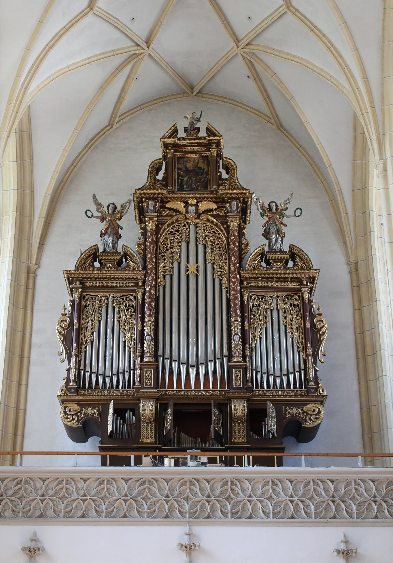 Orgel von St. Nikolaus in Neuötting (1980, G. Schmid, IV/49)